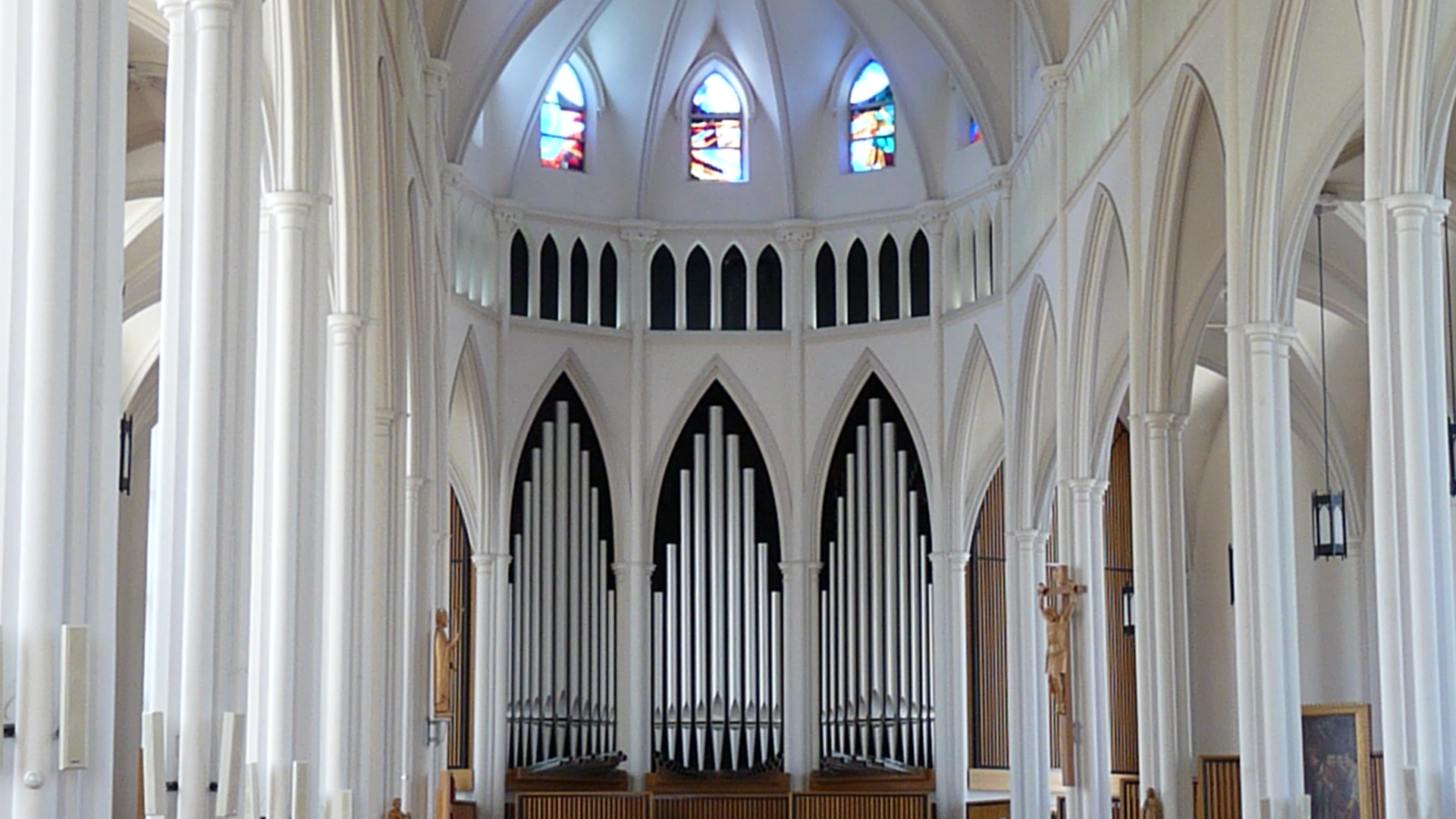 L'orgue Casavant et le choeur de la cathédrale Saint-Germain